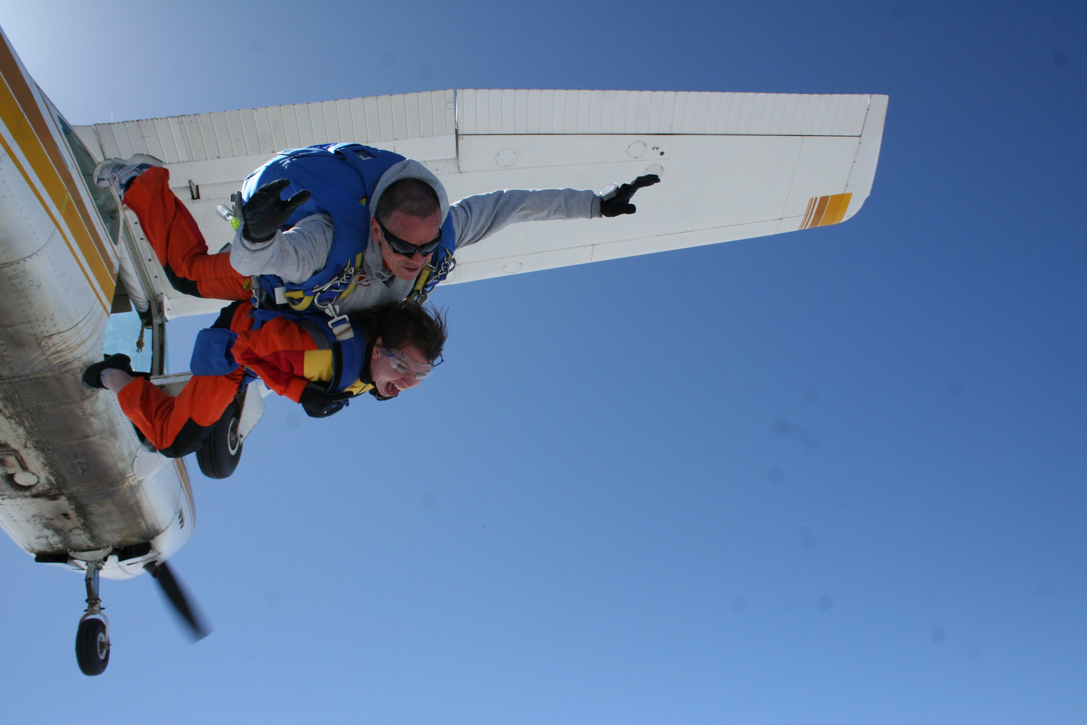 Plongeons à 200km/h vertical la mer à Granville parachutisme.